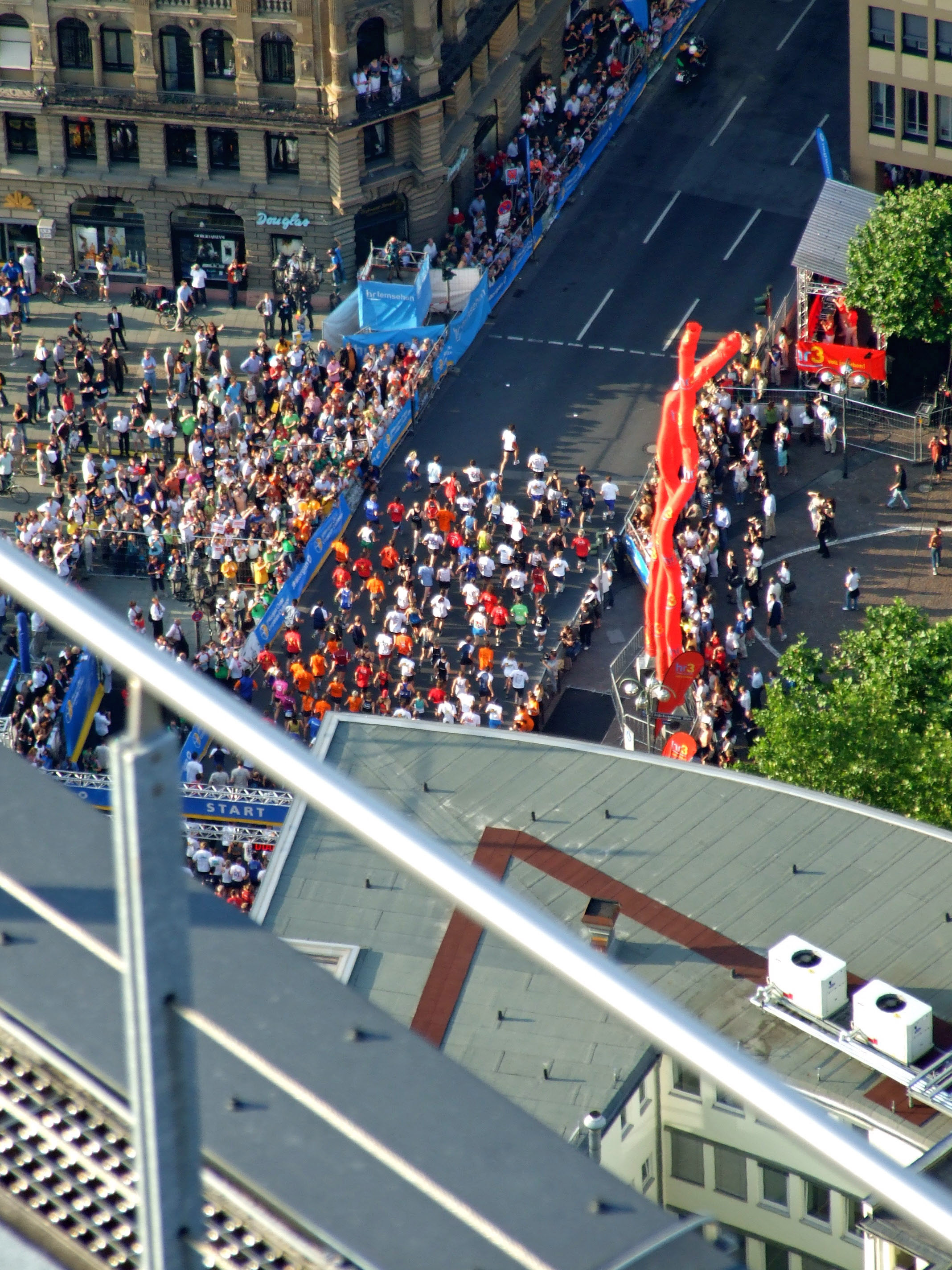 Start auf der Hochstrasse beim JPMorgan Chase Corporate Challenge 2007 in Ffm